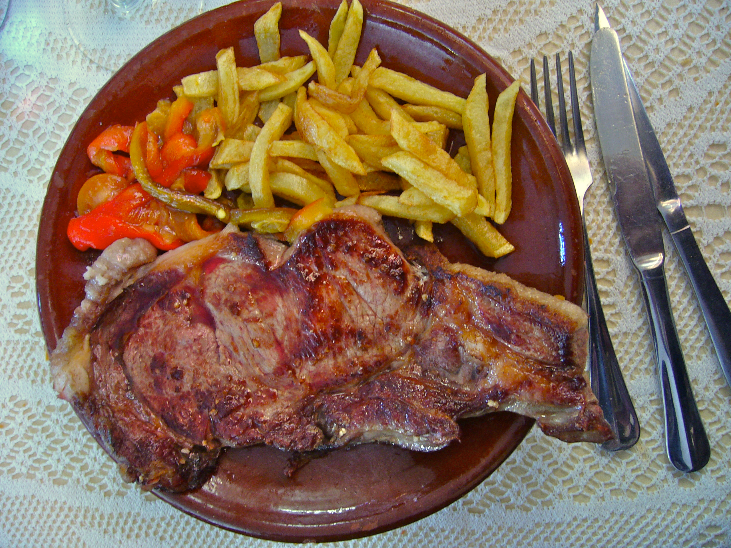 Restaurante el Porche las Casillas, Sotosalbos (Segovia), Enero 2007